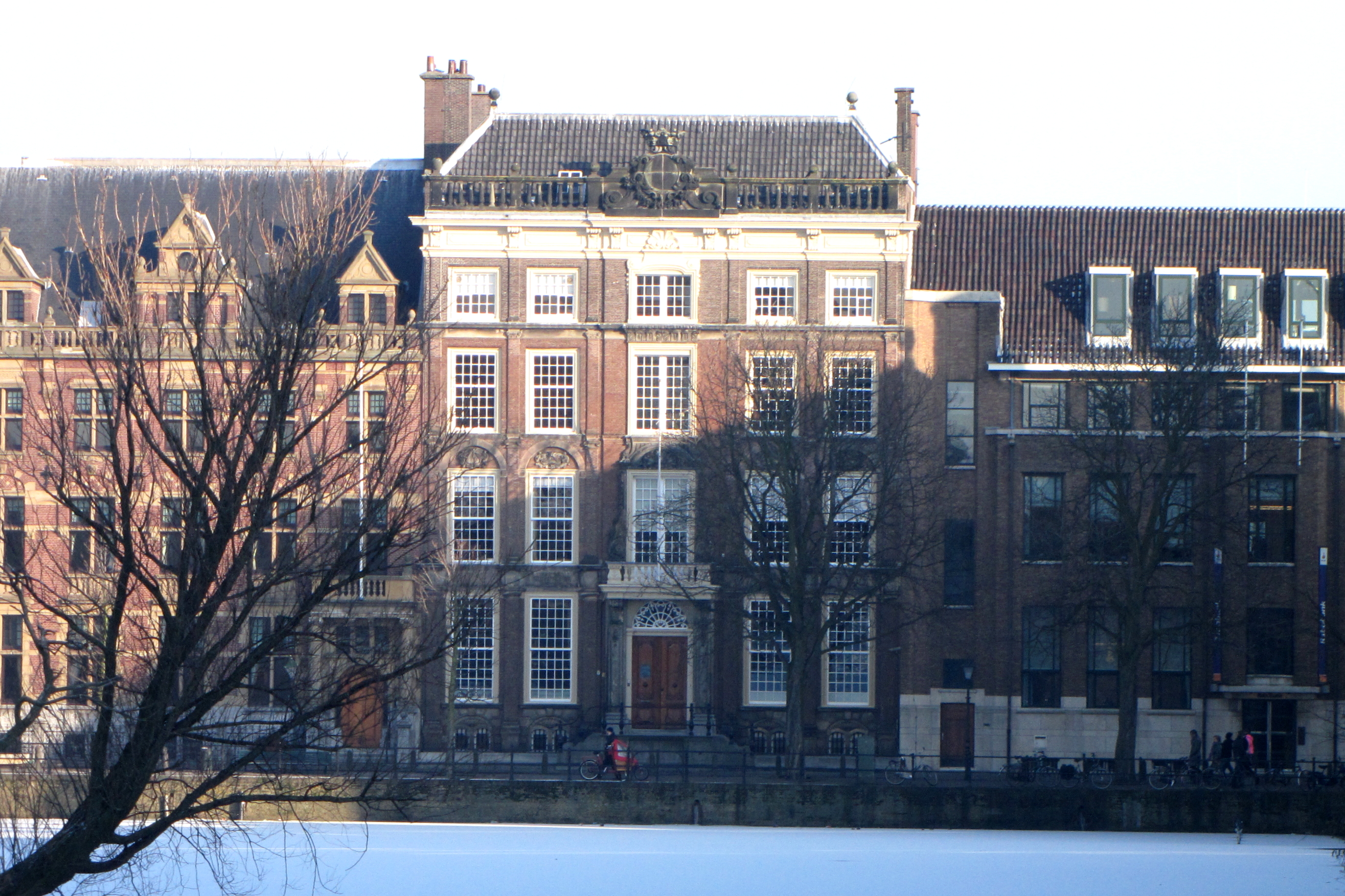 Gebouw van het Kabinet van de Koning in Den Haag, 2010. (Toen Kabinet van de Koningin.)